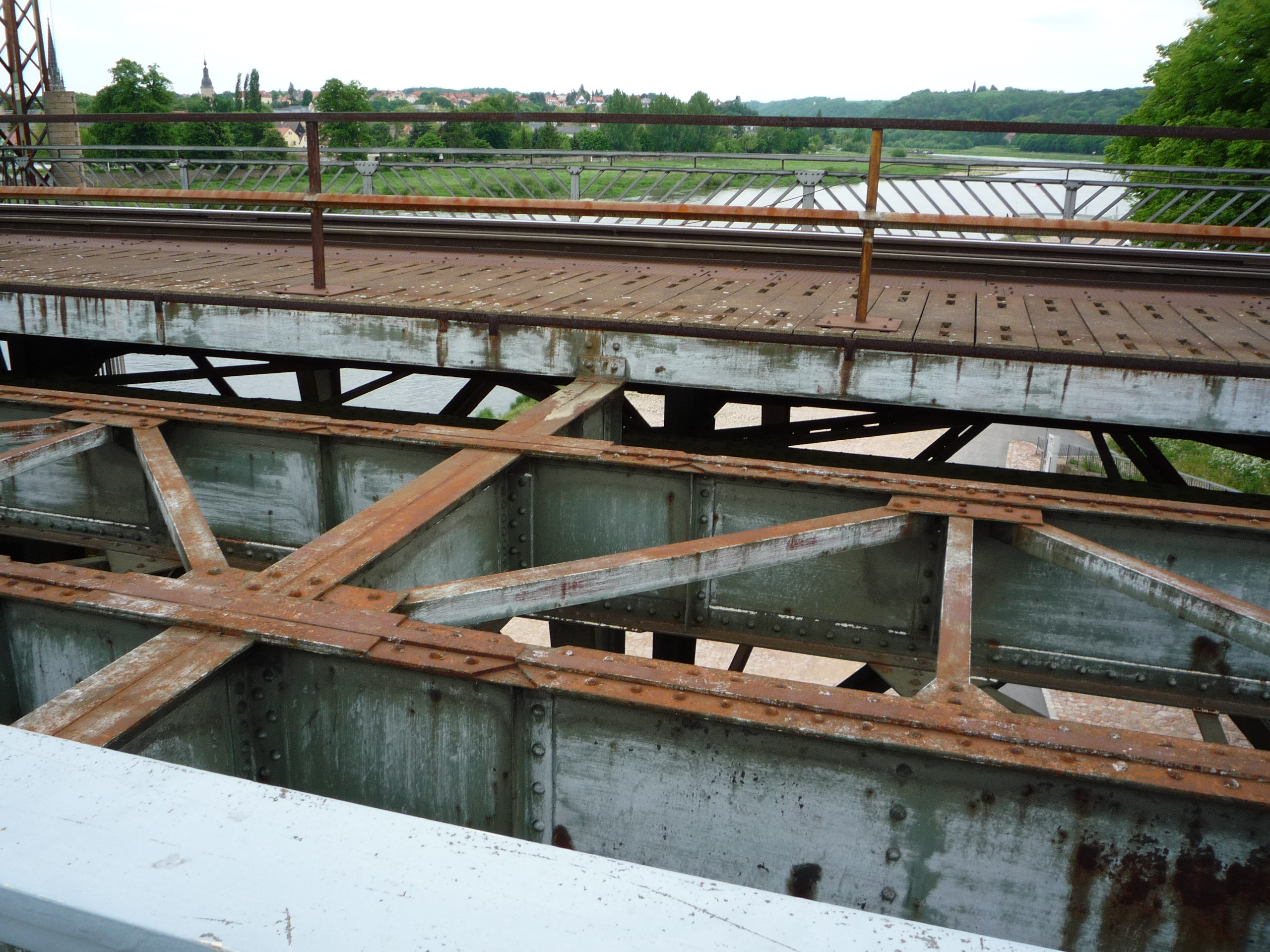 Die Eisenbahn- und Fußgängerbrücke in Meißen